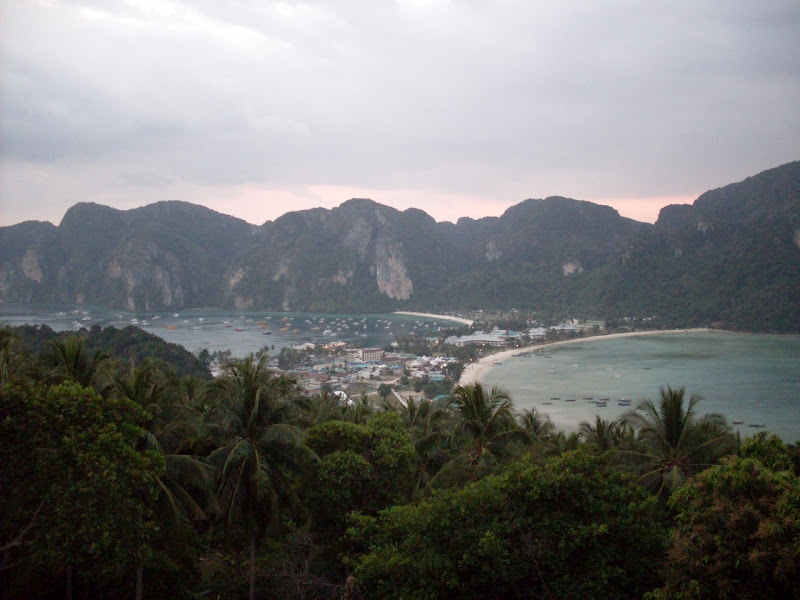 Ko Phi Phi Don Adasi.